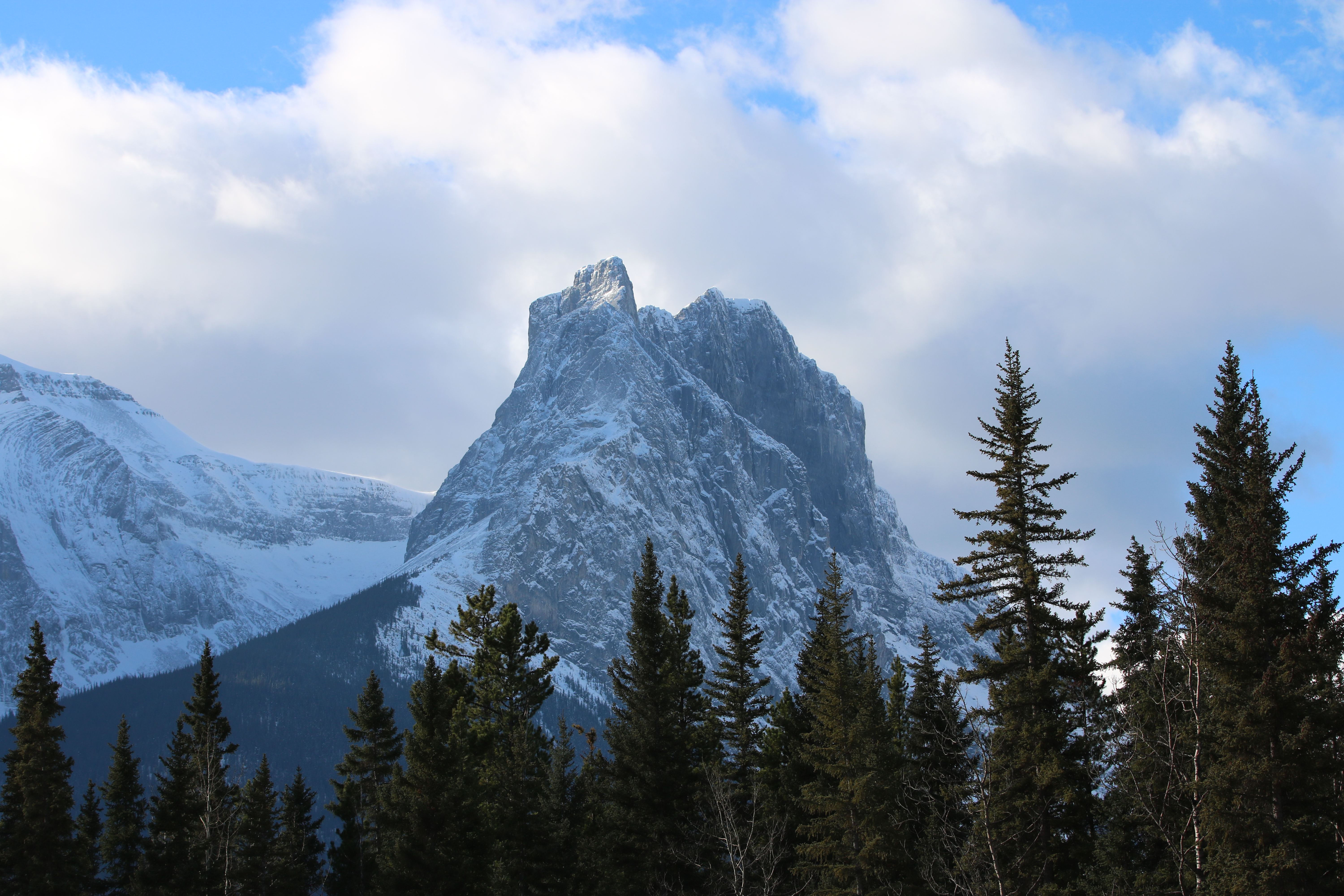 Alberta Canada Rocky mountains